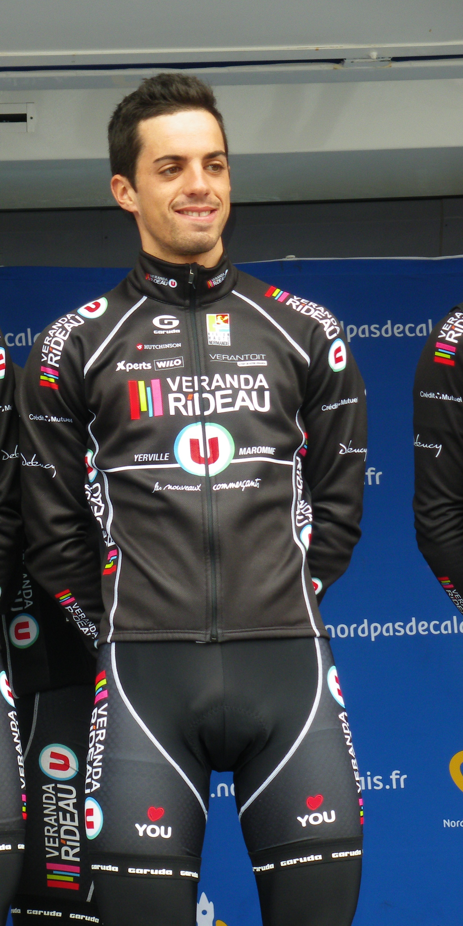 Présentation des coureurs au départ de la dernière étape : Romain Mathéou